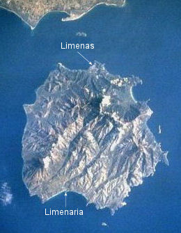 Satellitenbild der Griechischen Insel Thasos, vor der Makedonisch-Thrakischen Küste; Lage der Ortschaft Limenaria auf der Griechischen Insel Thasos.